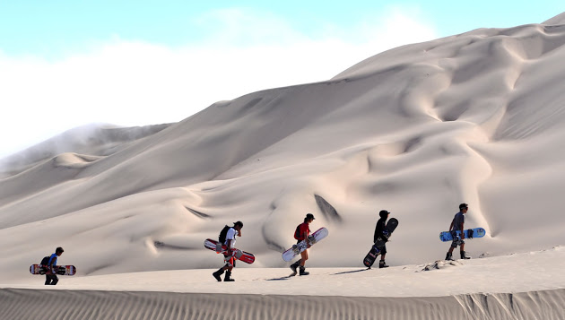 Sandboarders subiendo la Duna Toro Mata en Arequipa (Peru) la duna con el descenso de arena más larga del mundo.